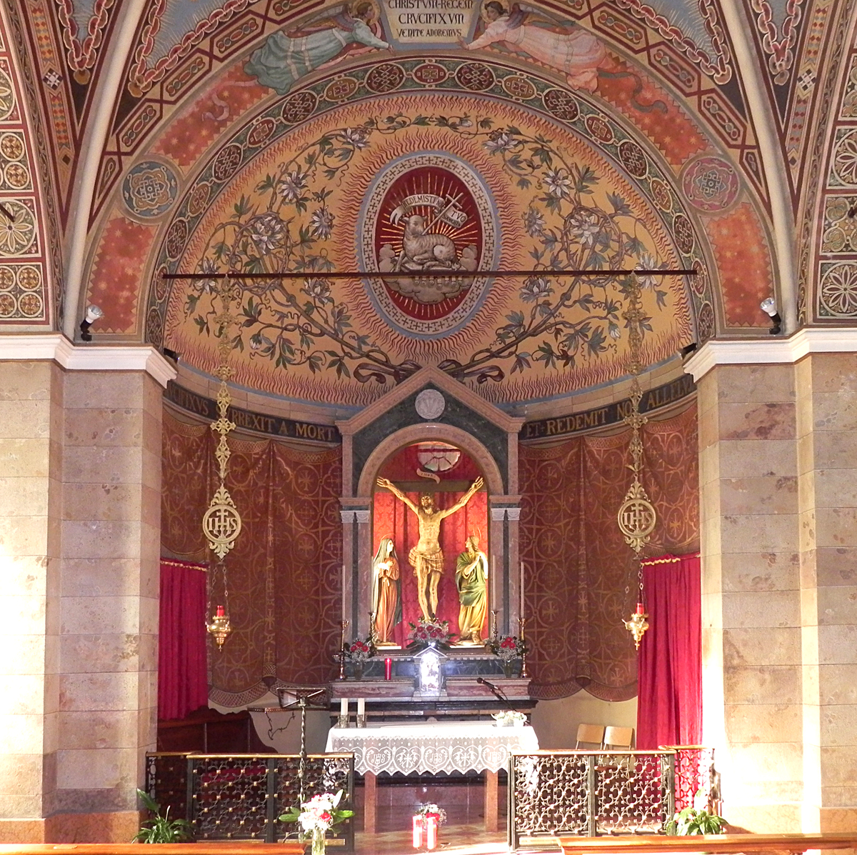 Interno (Visione del presbiterio) del Santuario del Santissimo Crocifisso a Gorno (BG)